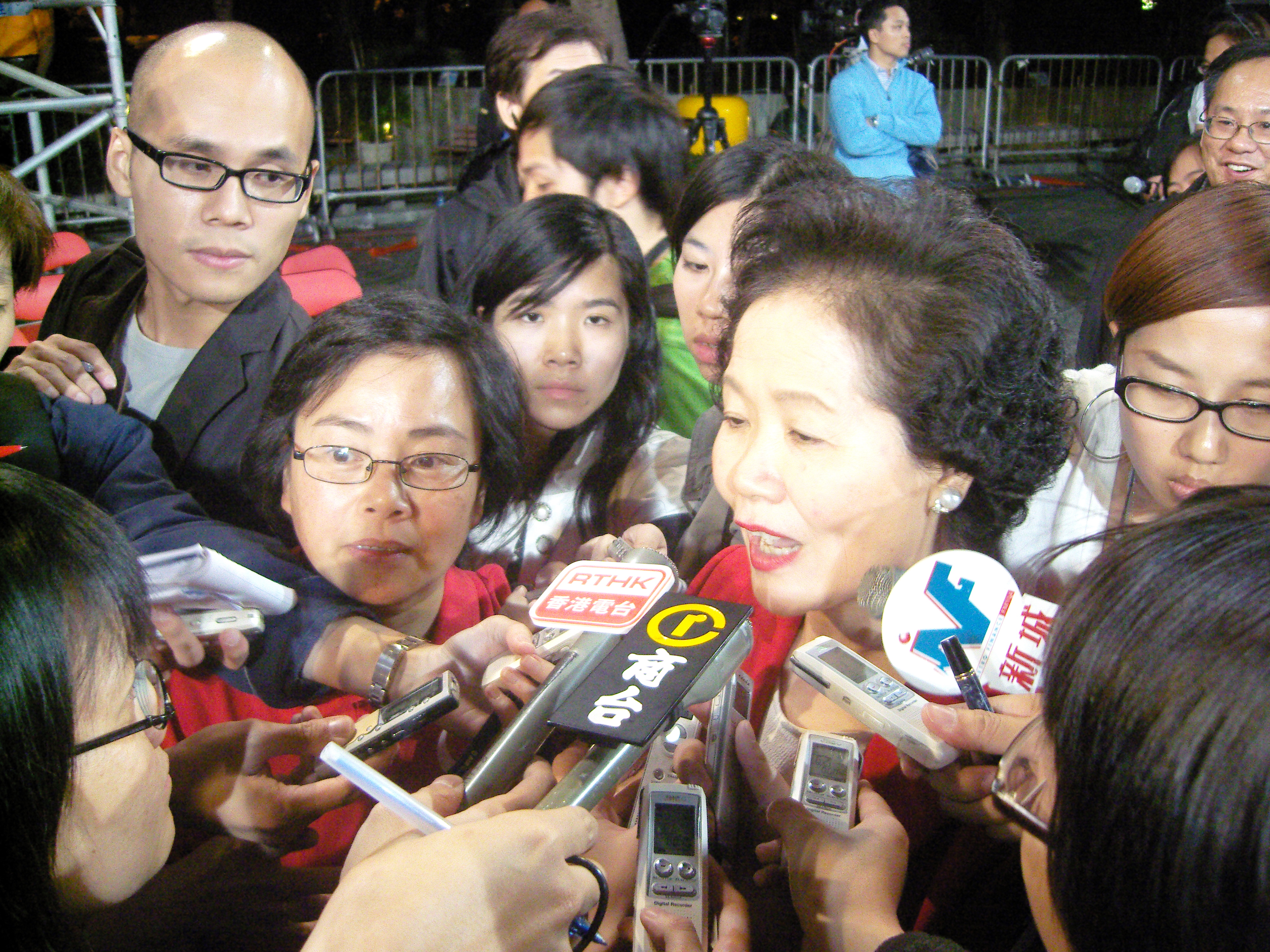 香港立法會港島區補選八大傳媒選舉論壇。